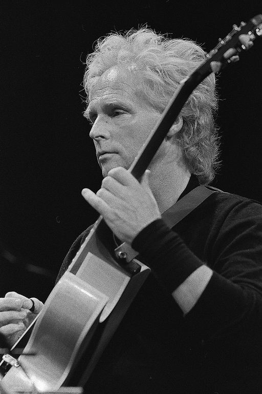 Odd-Arne Jacobsen